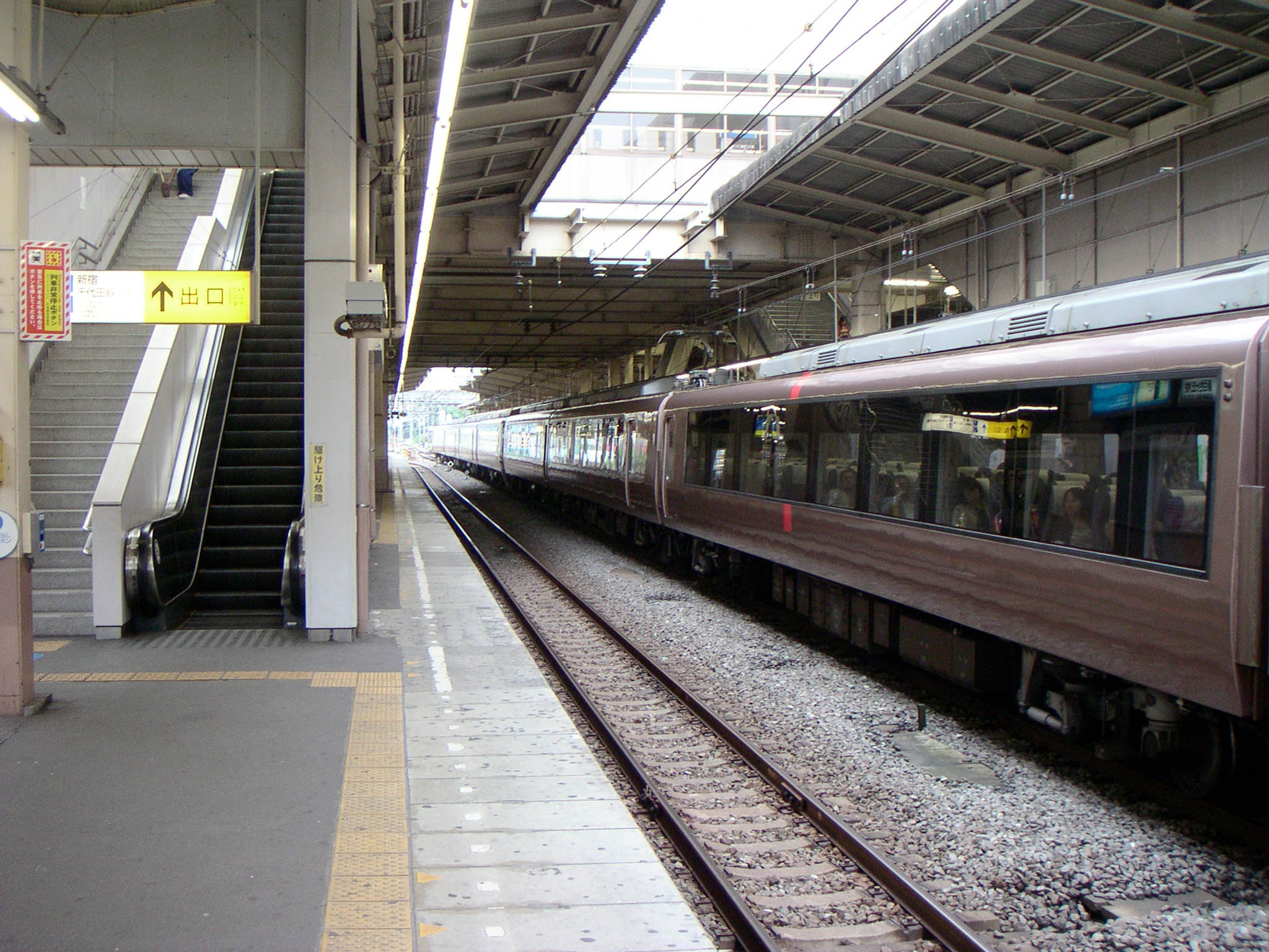 Shin-Yurigaoka Station